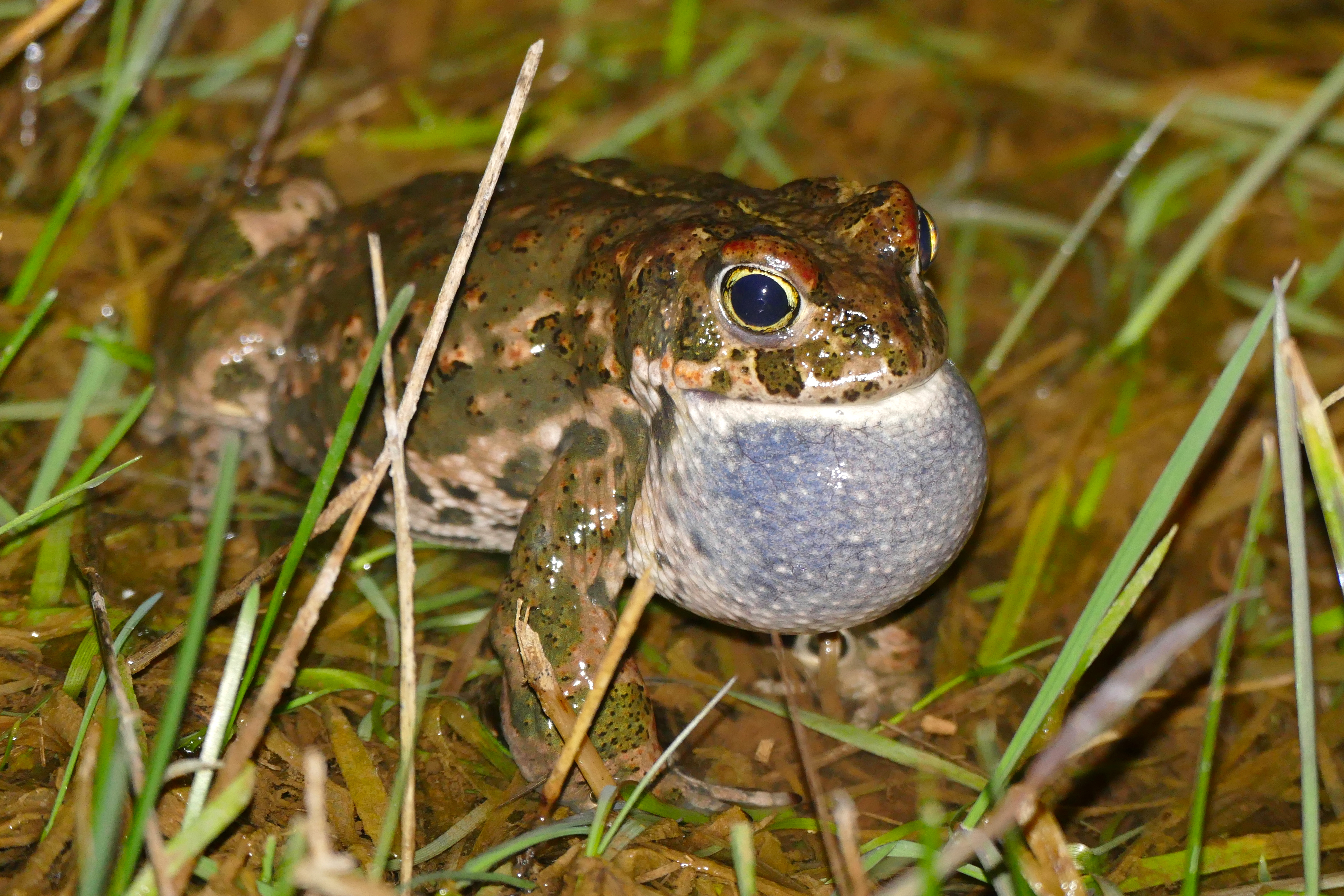 Lac des Rives, Les Rives, Hérault, FRANCE